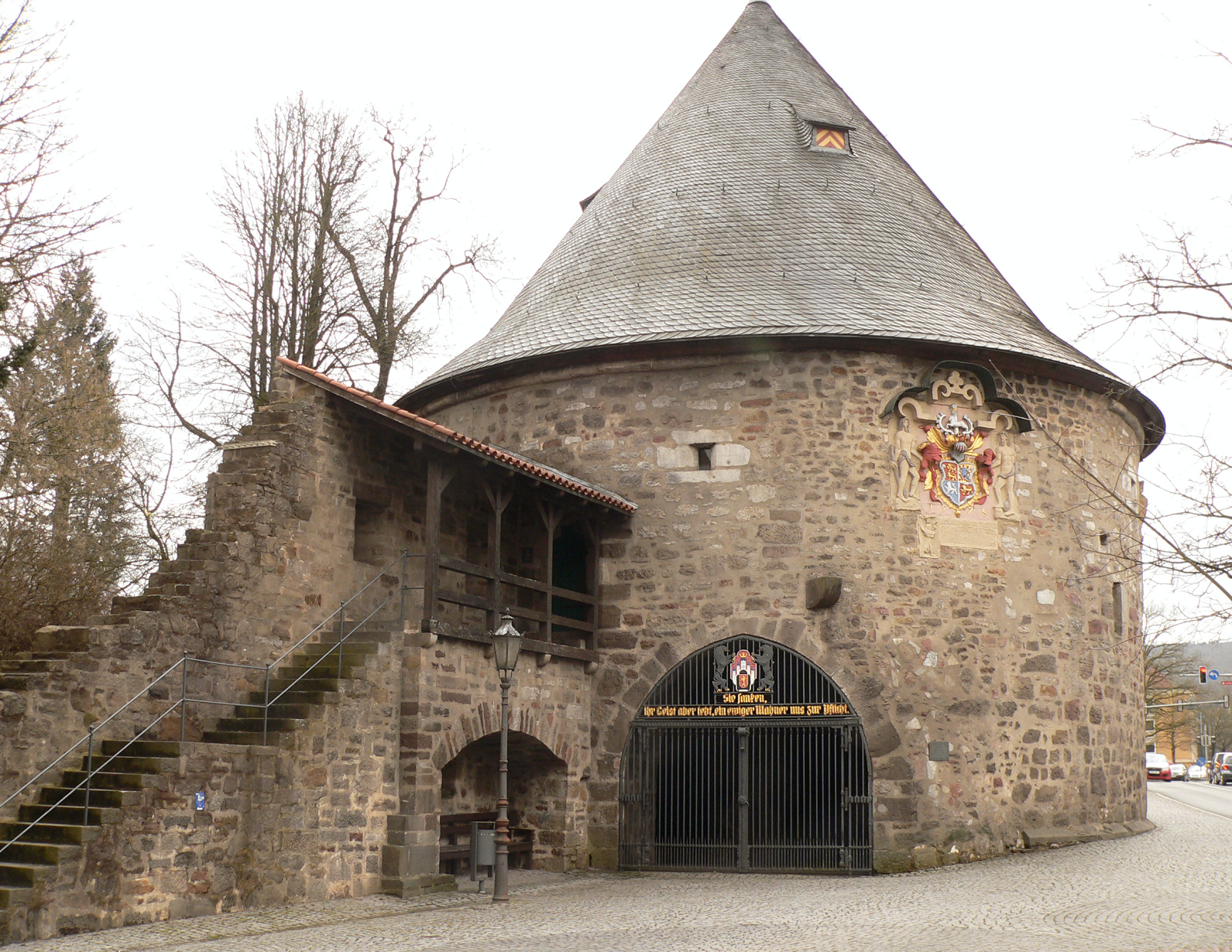 Rotunde mit Wehrgang